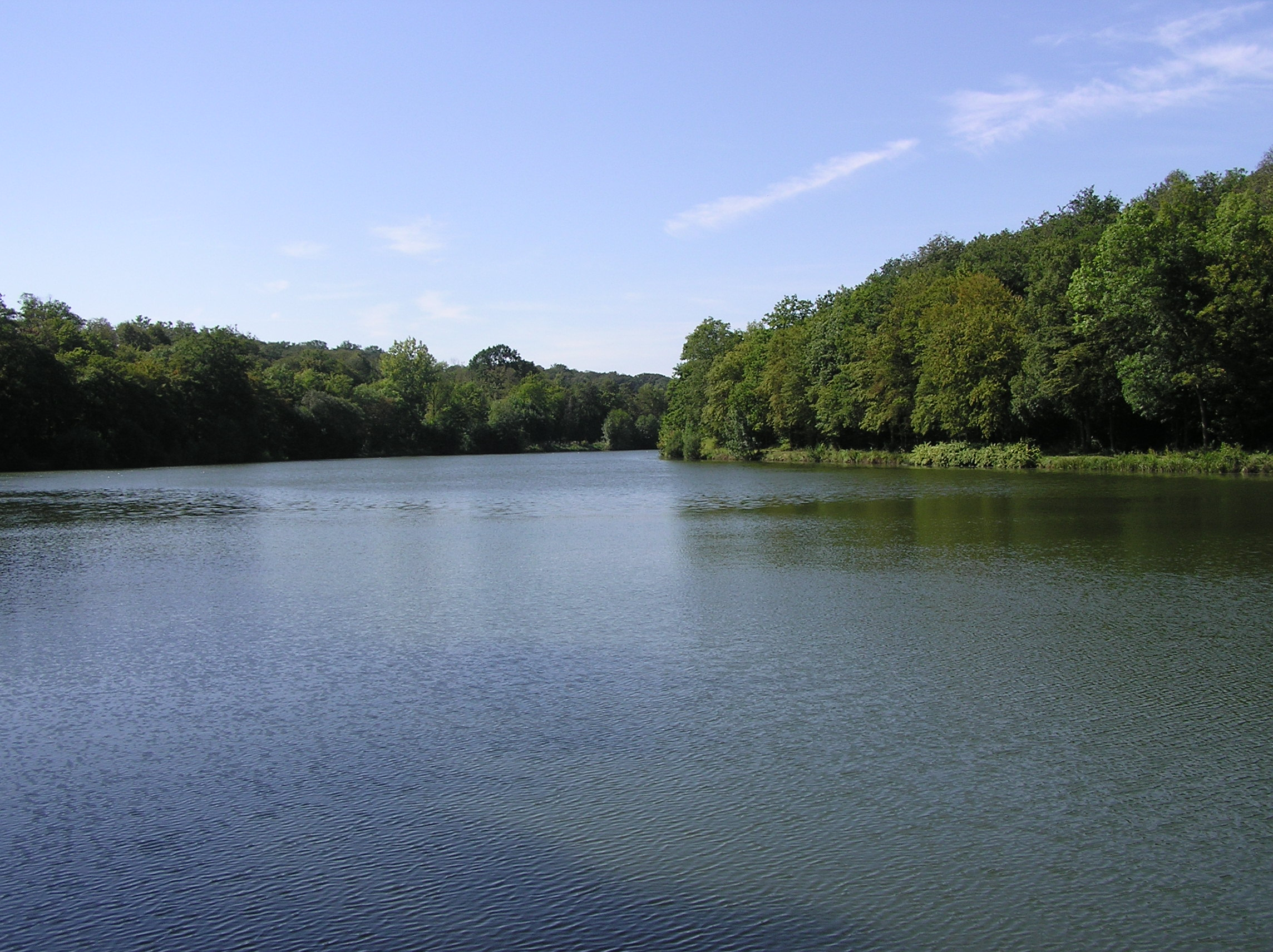 Vue générale des Étangs de La Minière à Guyancourt (Yvelines, France)